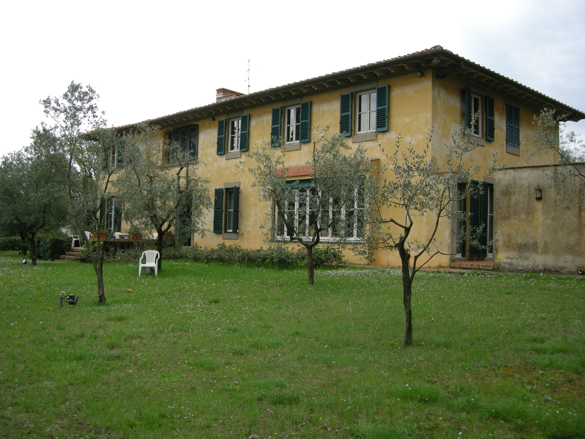 Fondazione spadolini 04